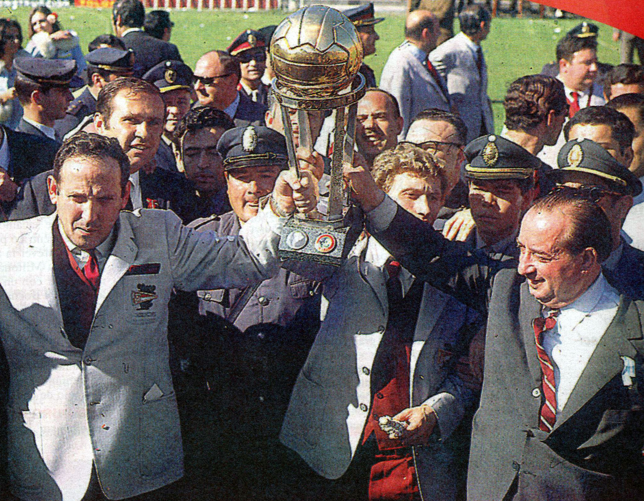 Osvaldo Zubeldía y Mariano Mangano, entrenador y presidente, respectivamente, del Estudiantes de La Plata Campeón del Mundo. En el medio, con la Copa Intercontinental, el capitán del equipo, Oscar Malbernat.